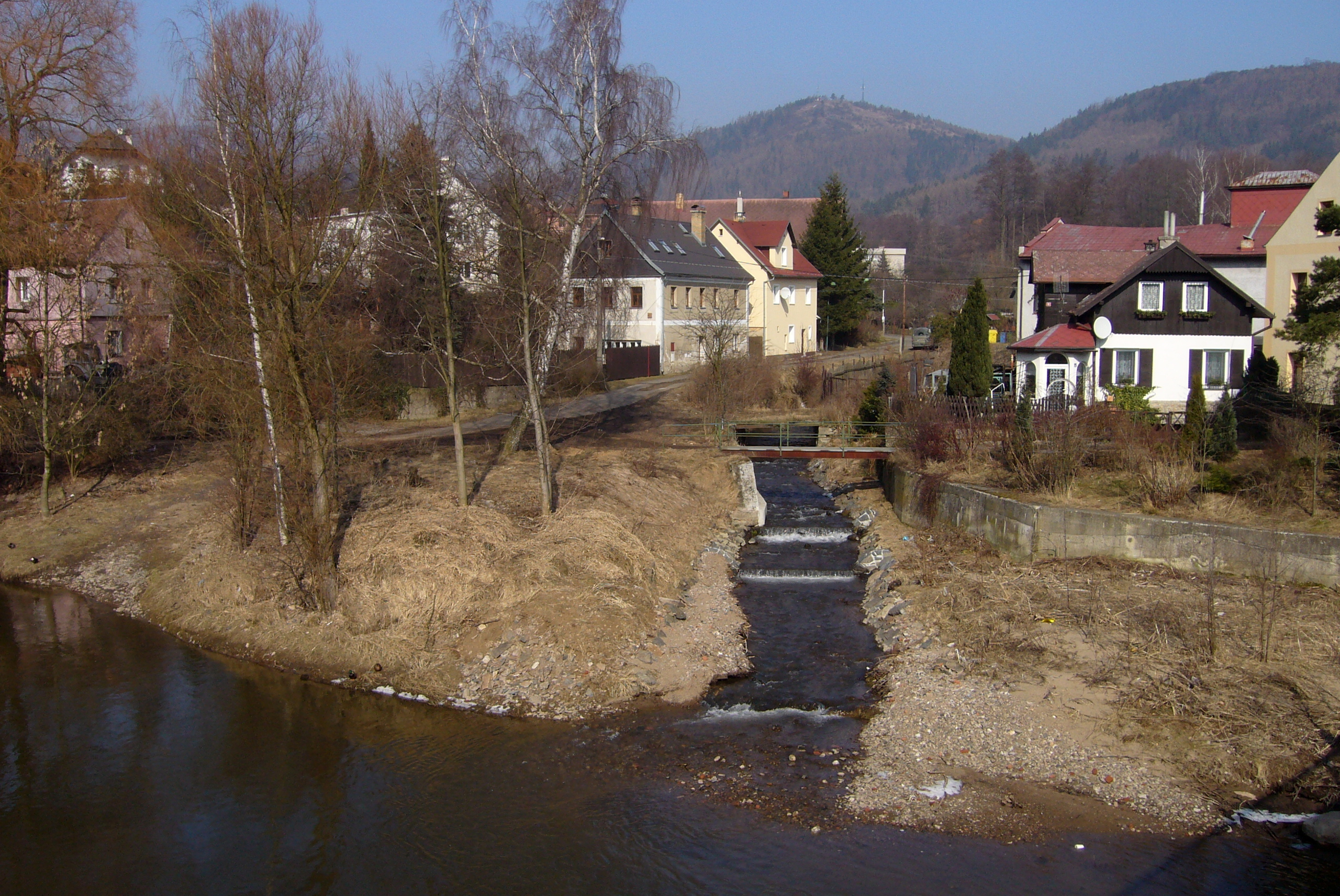 Lužný - soutok Hučivého potoka s Ohří